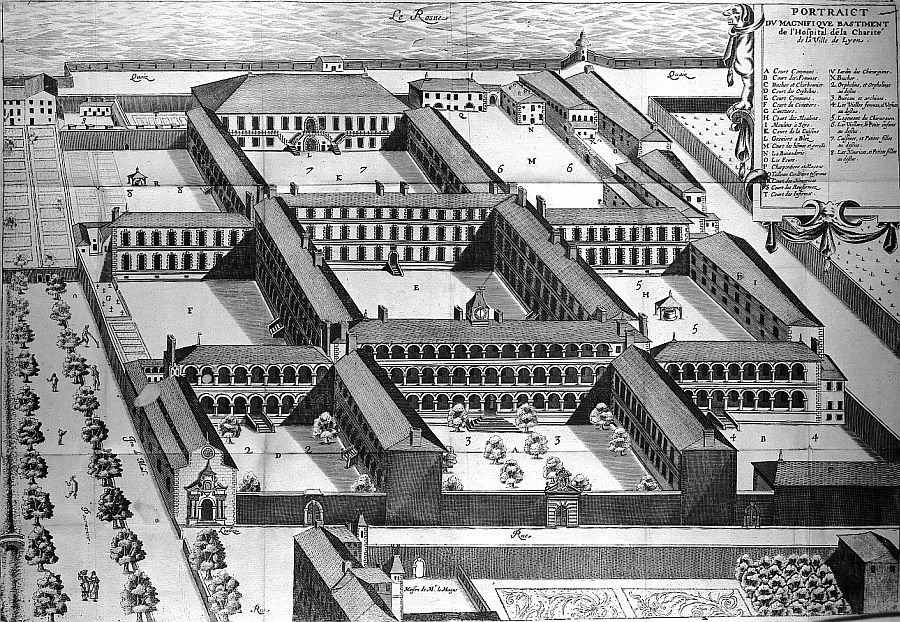 Portraict du magnifique bastiment de l'Hospital de la Charité de la ville de Lyon.